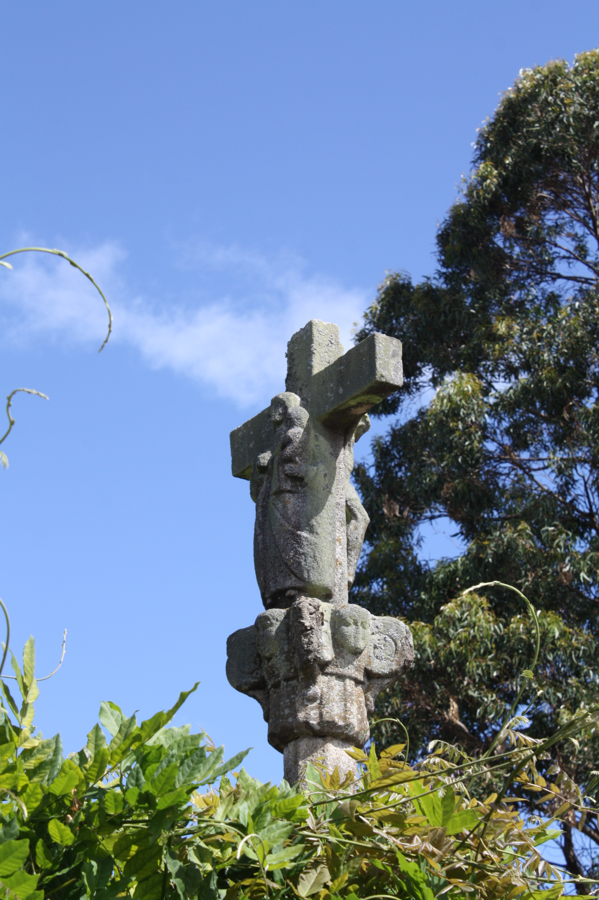 Cruceiro no lugar de Forxán, parroquia de Adina, concello de Sanxenxo (Pontevedra)